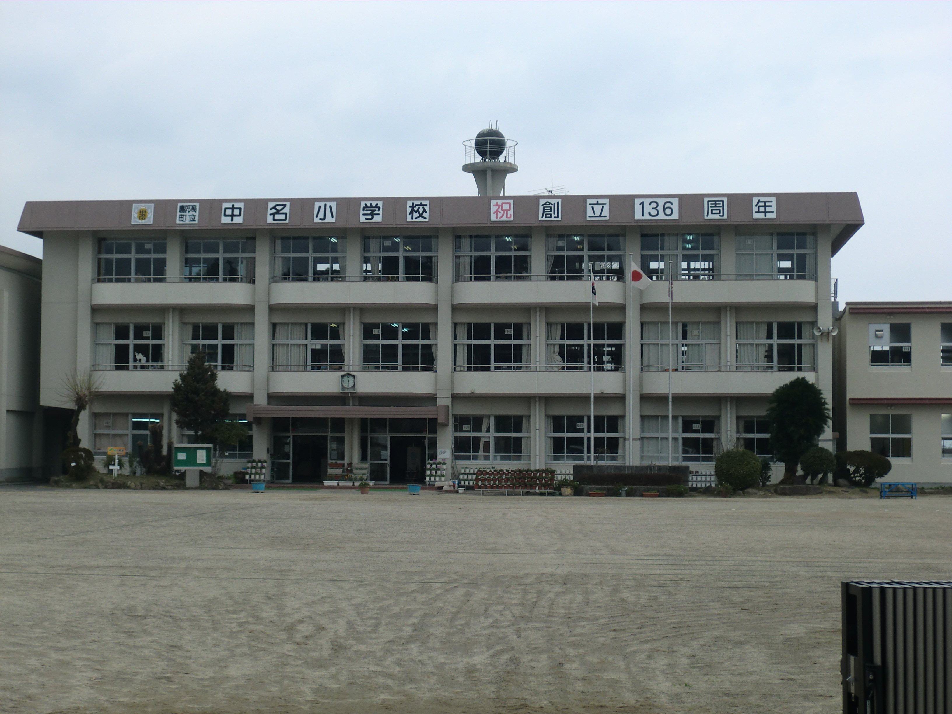 鹿児島市にある鹿児島市立中名（なかみょう）小学校